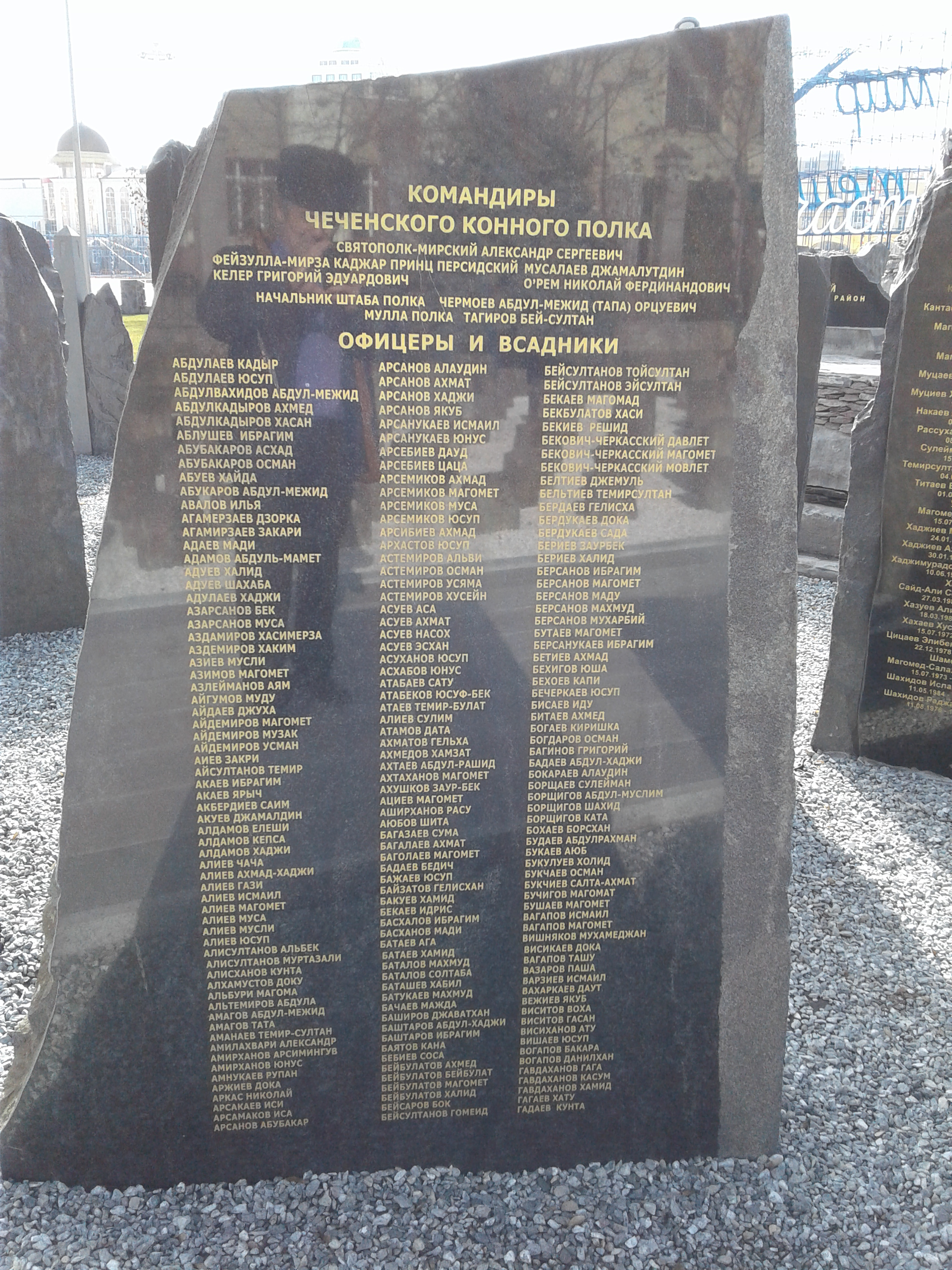 Мемориал памяти погибших в борьбе с терроризмом в Грозном